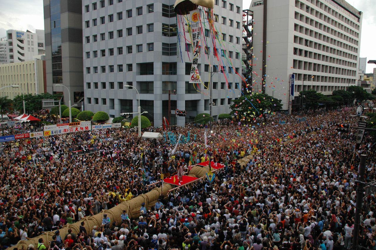 那覇まつり（那覇大綱挽）。写真提供那覇市